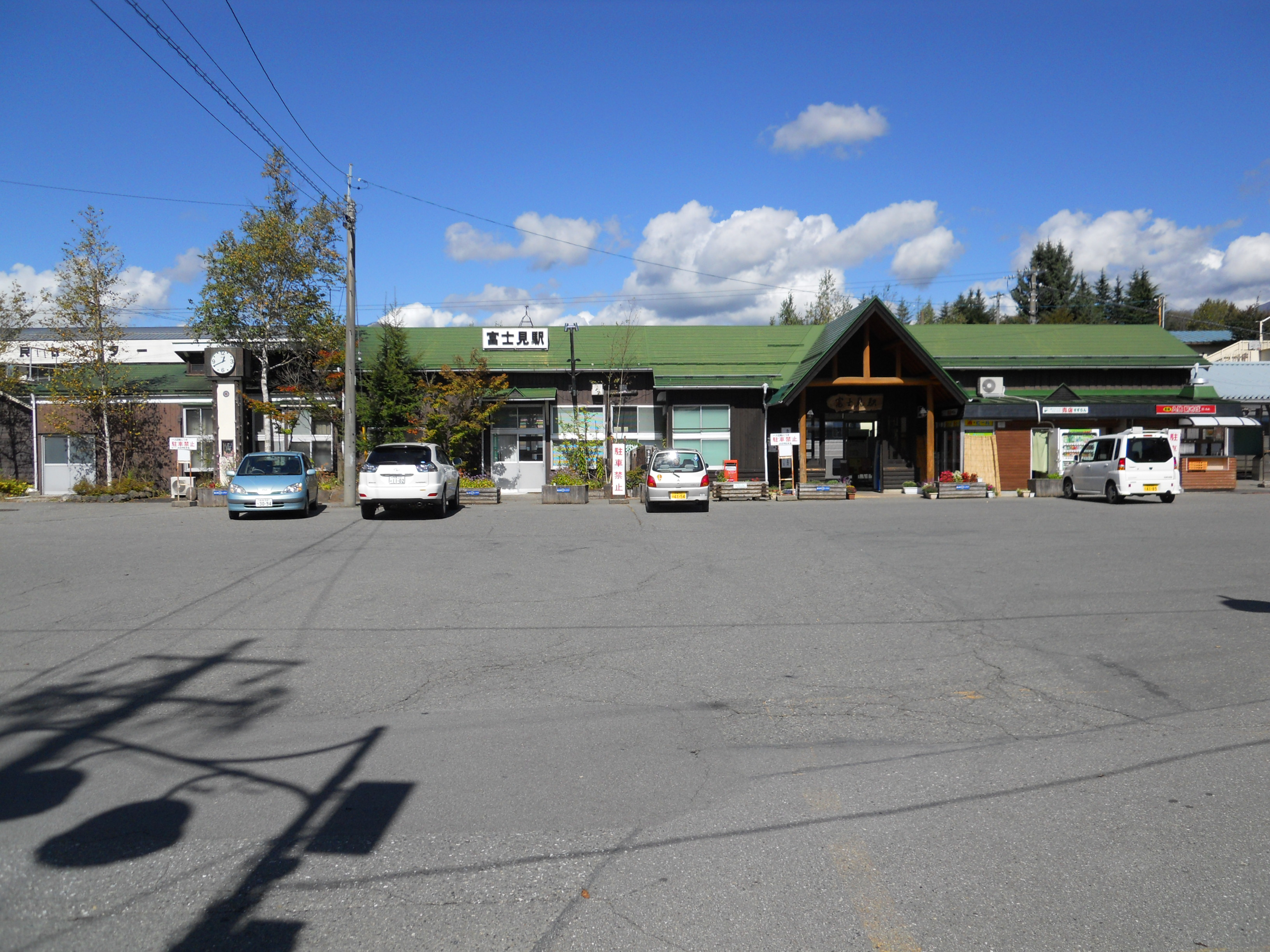 JR中央線富士見駅